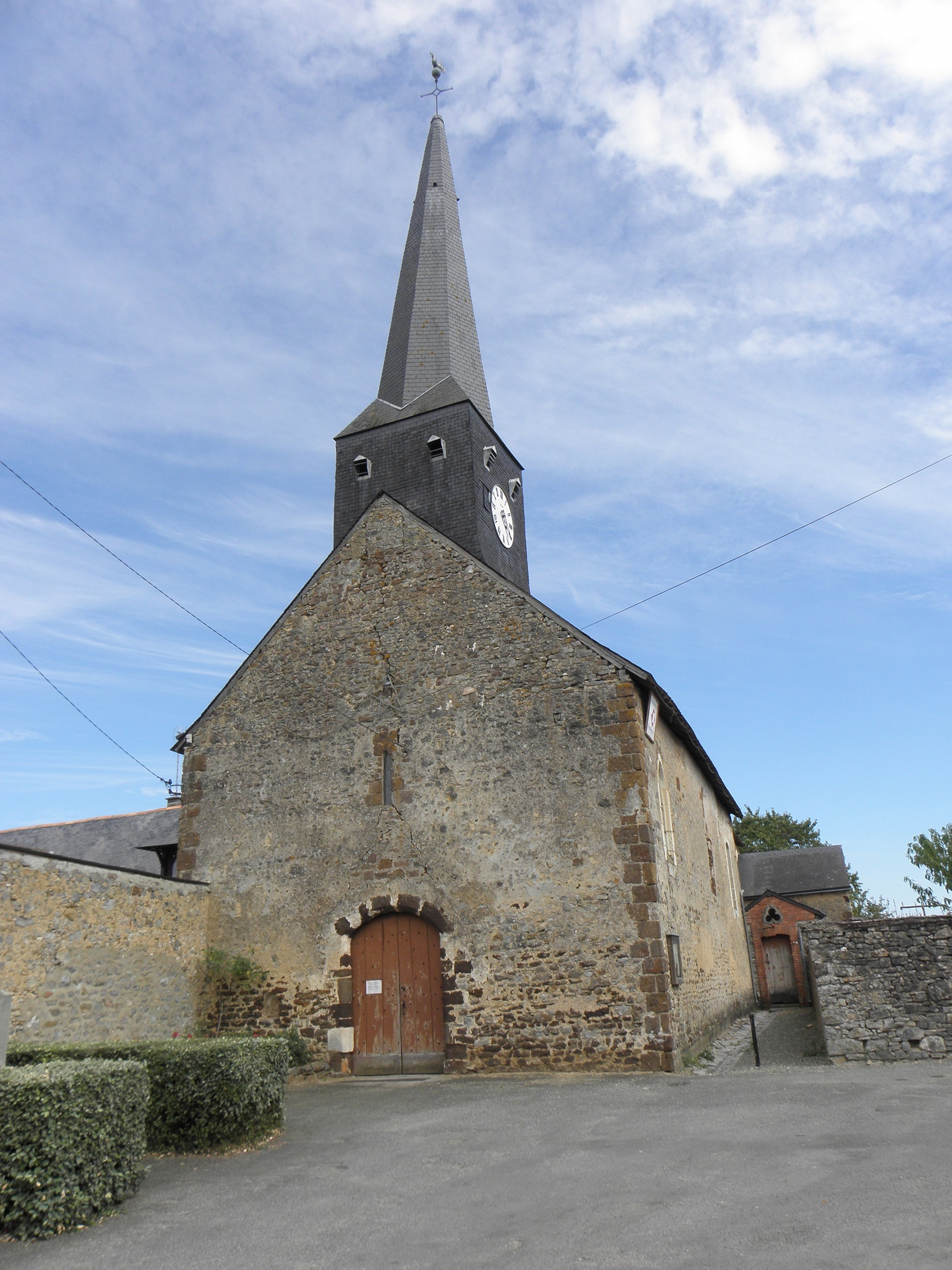 Église de Saint-Loup-du-Dorat (53).